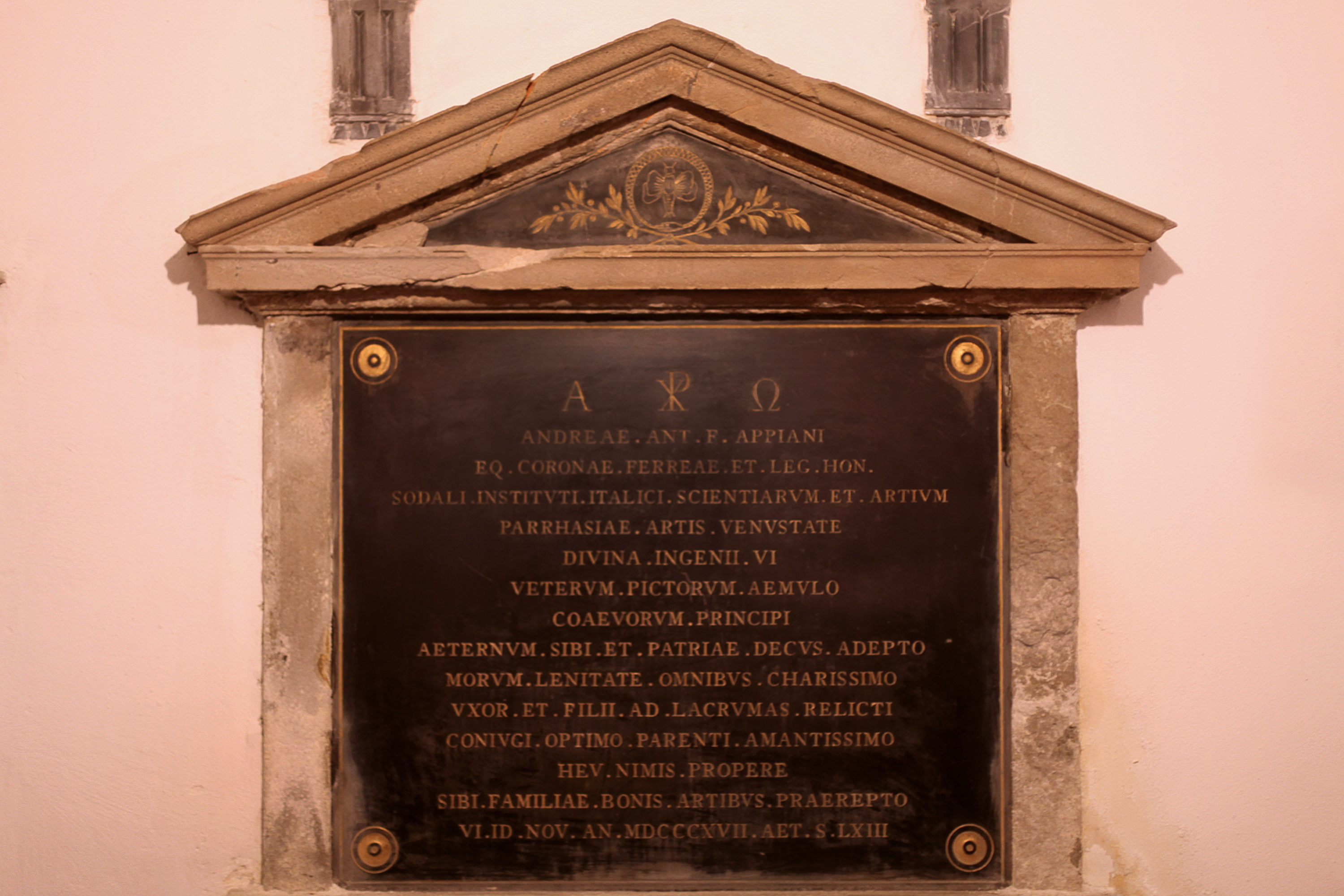 Lapide funeraria di Andrea Appiani (1754-1817), originariamente al cimitero di San Gregorio, oggi nella cripta della chiesa di San Gregorio Magno, Milano